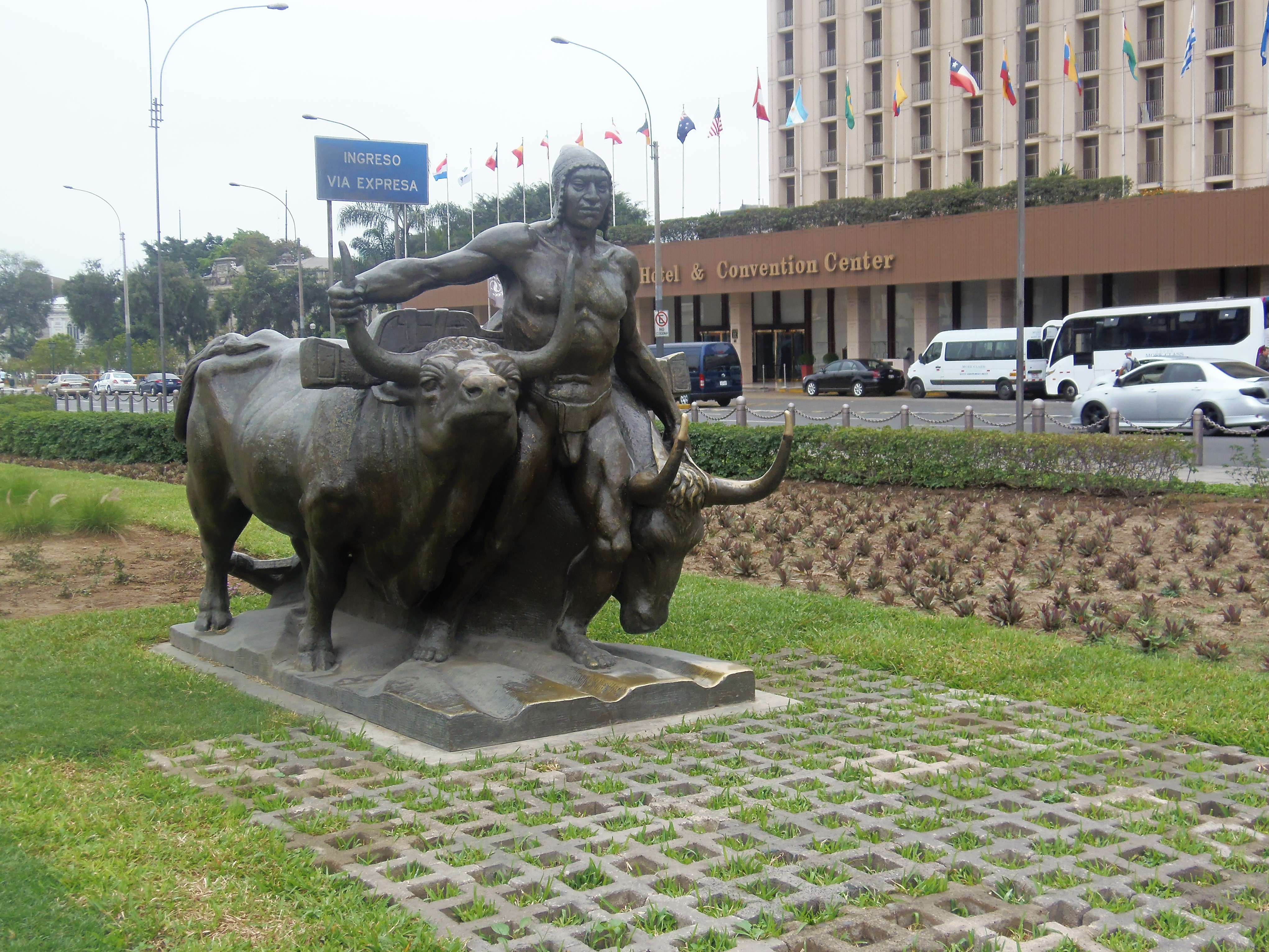 La yunta, escultura del artista Ismael Pozo, en el Paseo de los Héroes en la ciudad de Lima, Perú.